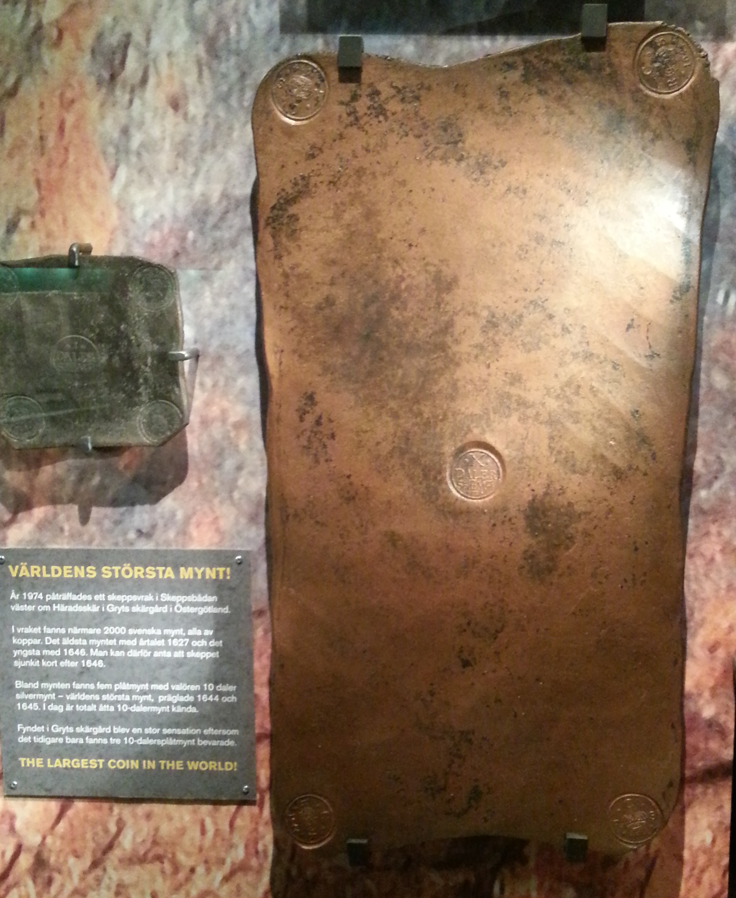 Plåtmynt 10 daler sm utställt på Kungl. Myntkabinettet i Stockholm.